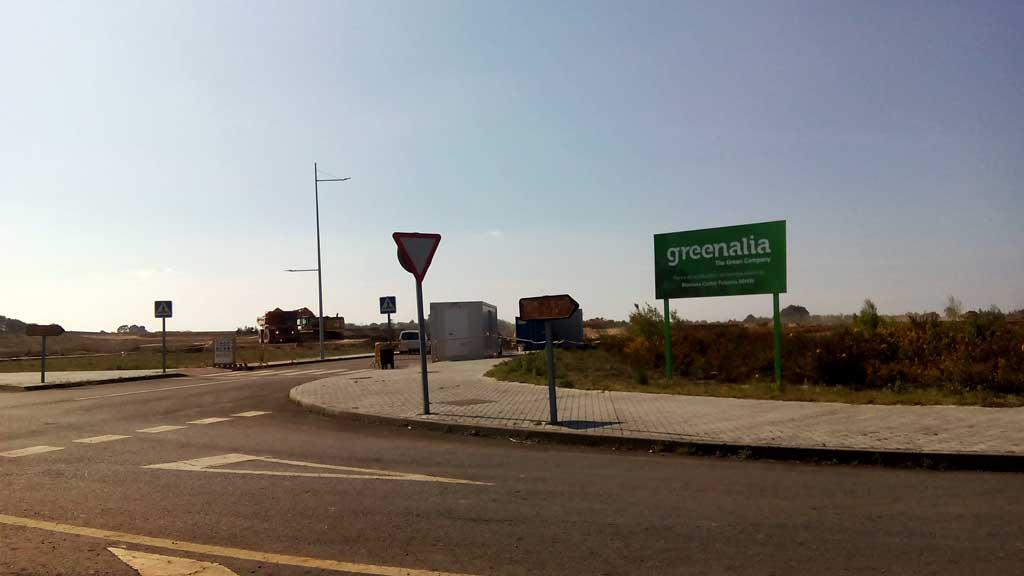 Planta Greenalia en Curtis en construción.